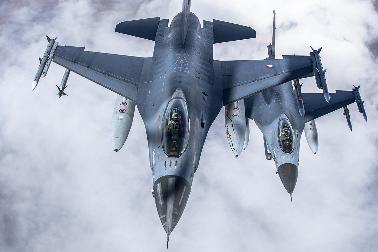 Litouwen, 15 maart 2017, Nederlandse F16's bewaken het luchtruim van Litouwen. Air to Air beelden van twee F16 boven het luchtruim van Litouwen.